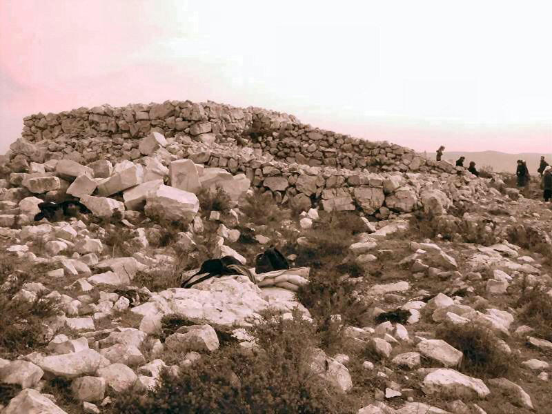 המזבח בהר עיבל במלוא הדרו - מבט ממערב